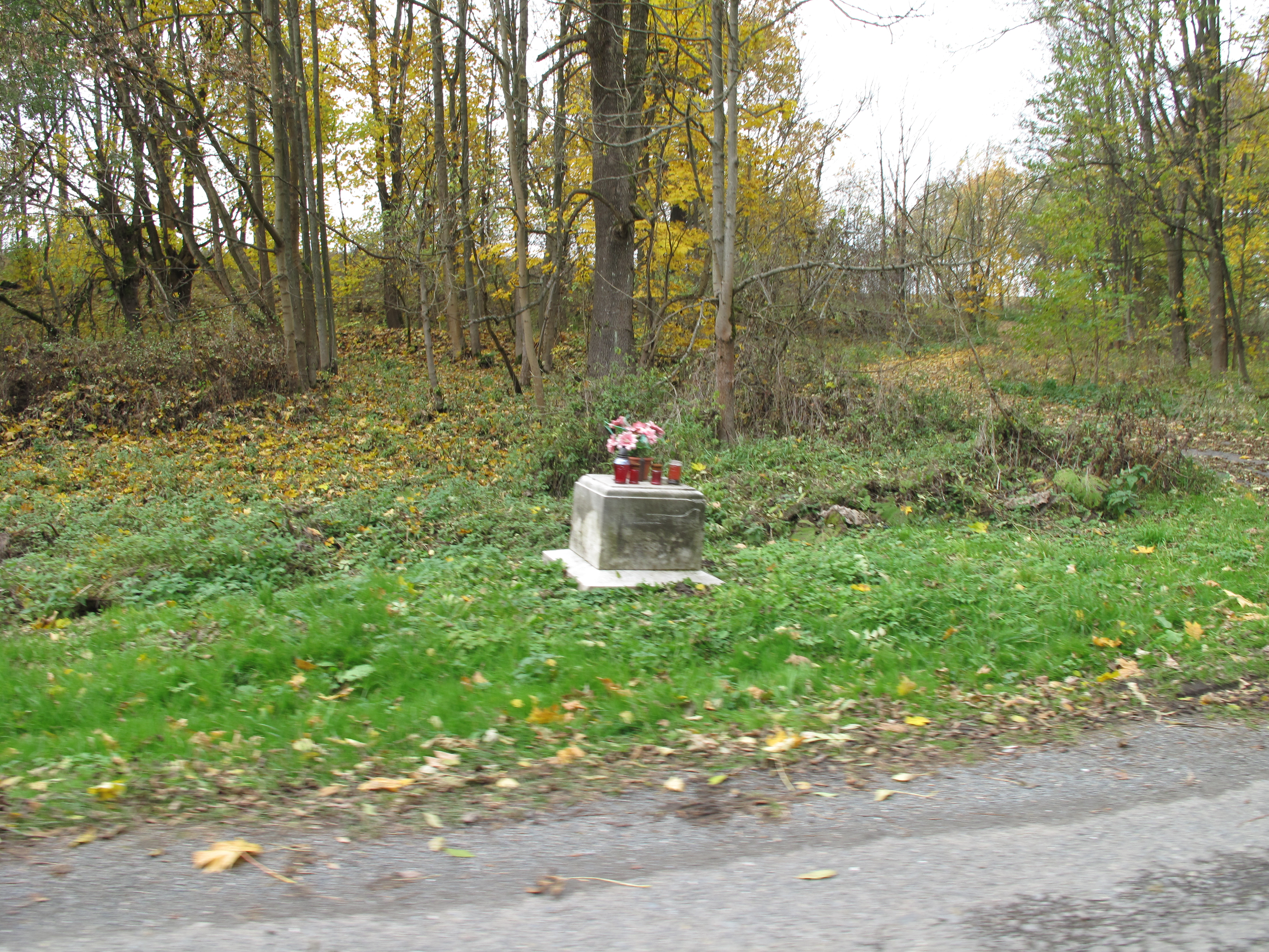 Rejchartice (Dvorce). Okres Bruntál, Česká republika.